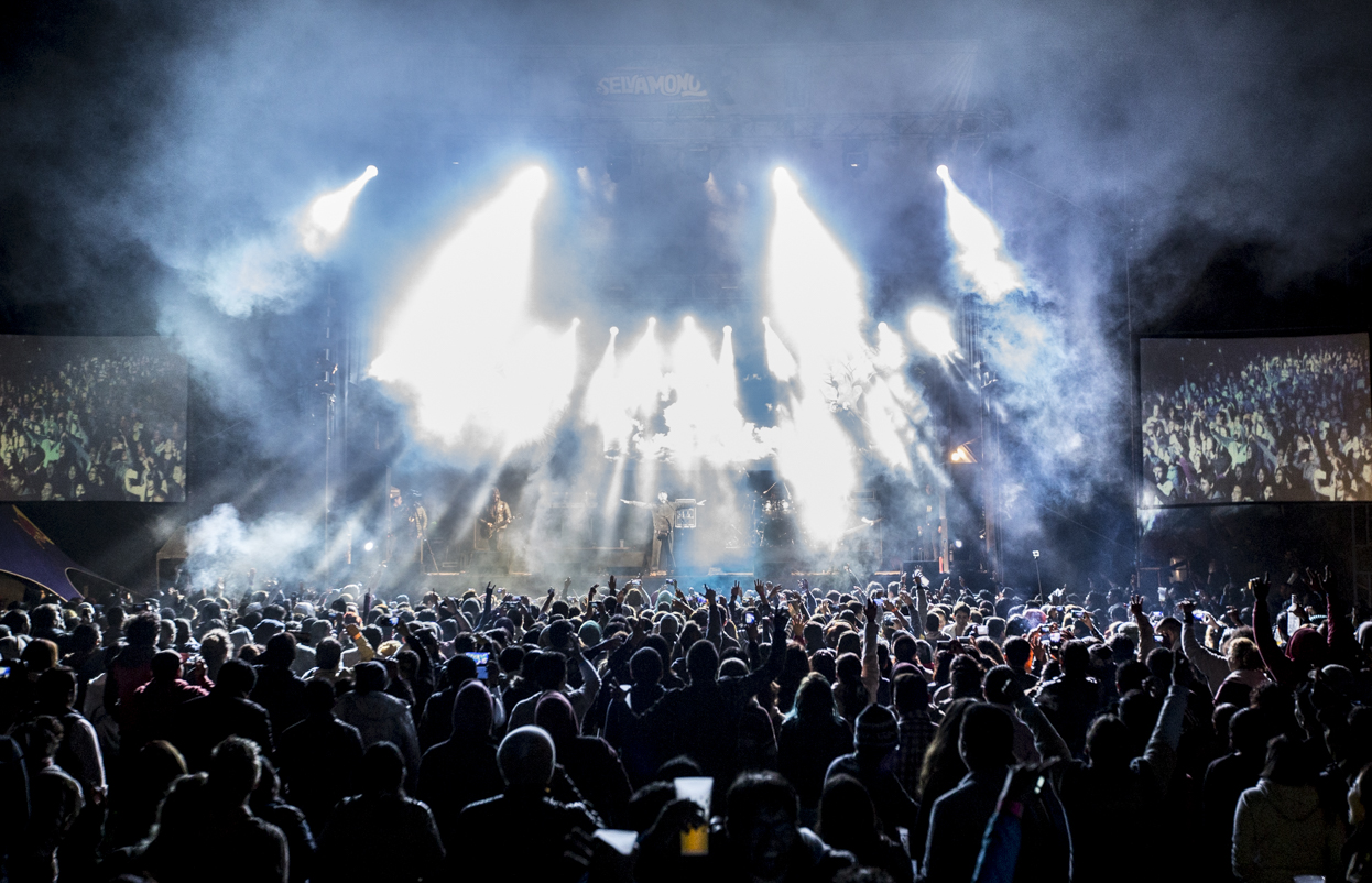 La escena del Festival Selvámonos